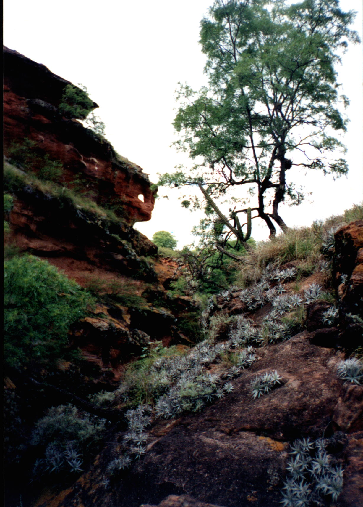 Cañon del Ojo del Lagarto